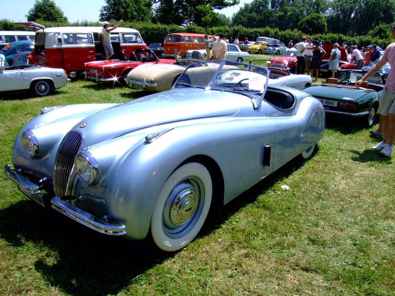 Jaguar XK 120 1950